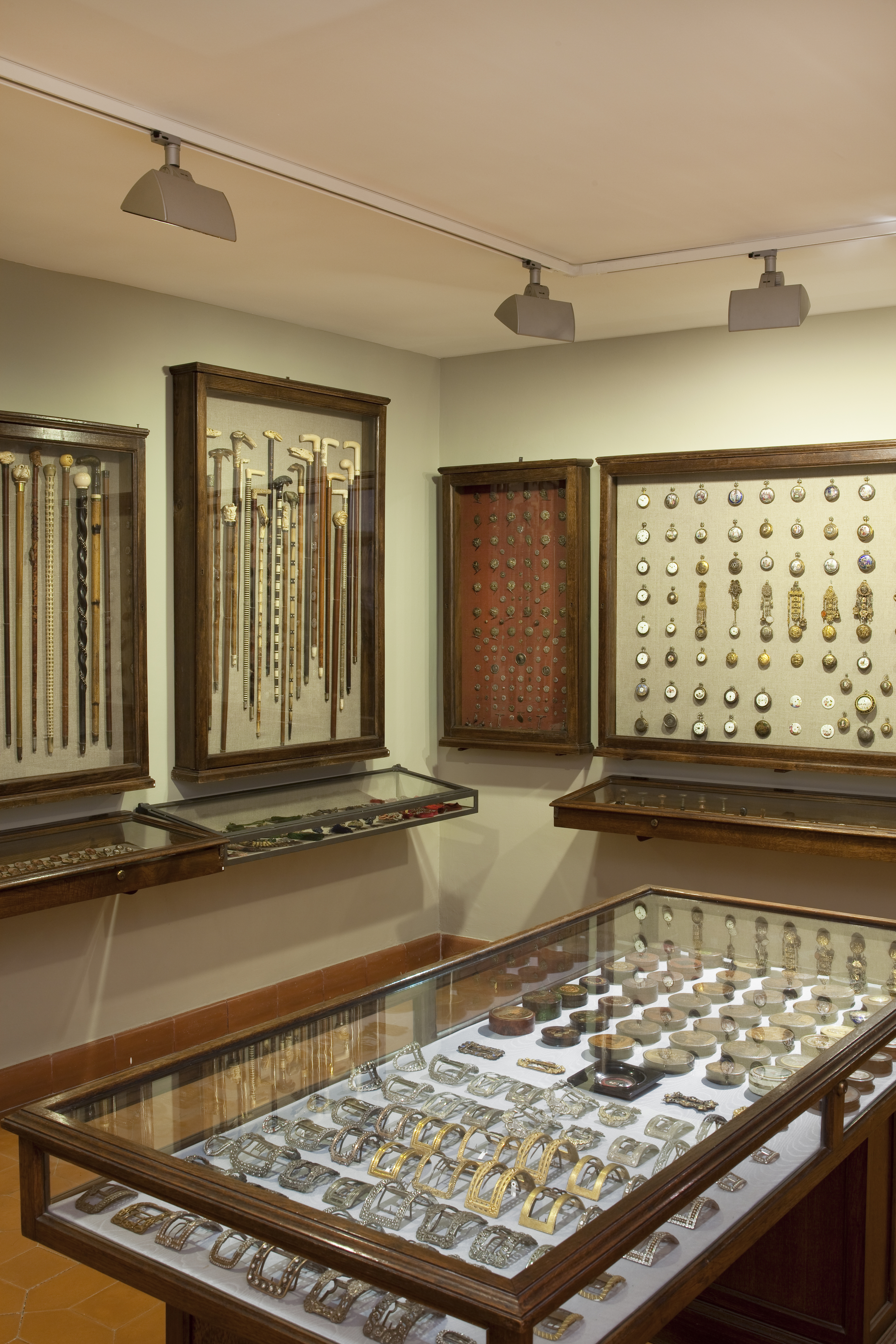 Masculina Gabinet col·leccionista - Fot. GUILLEM F-H.jpg